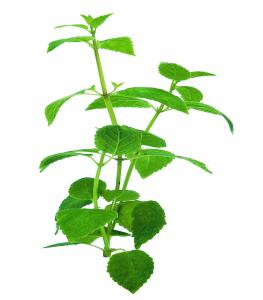 Planta Muña